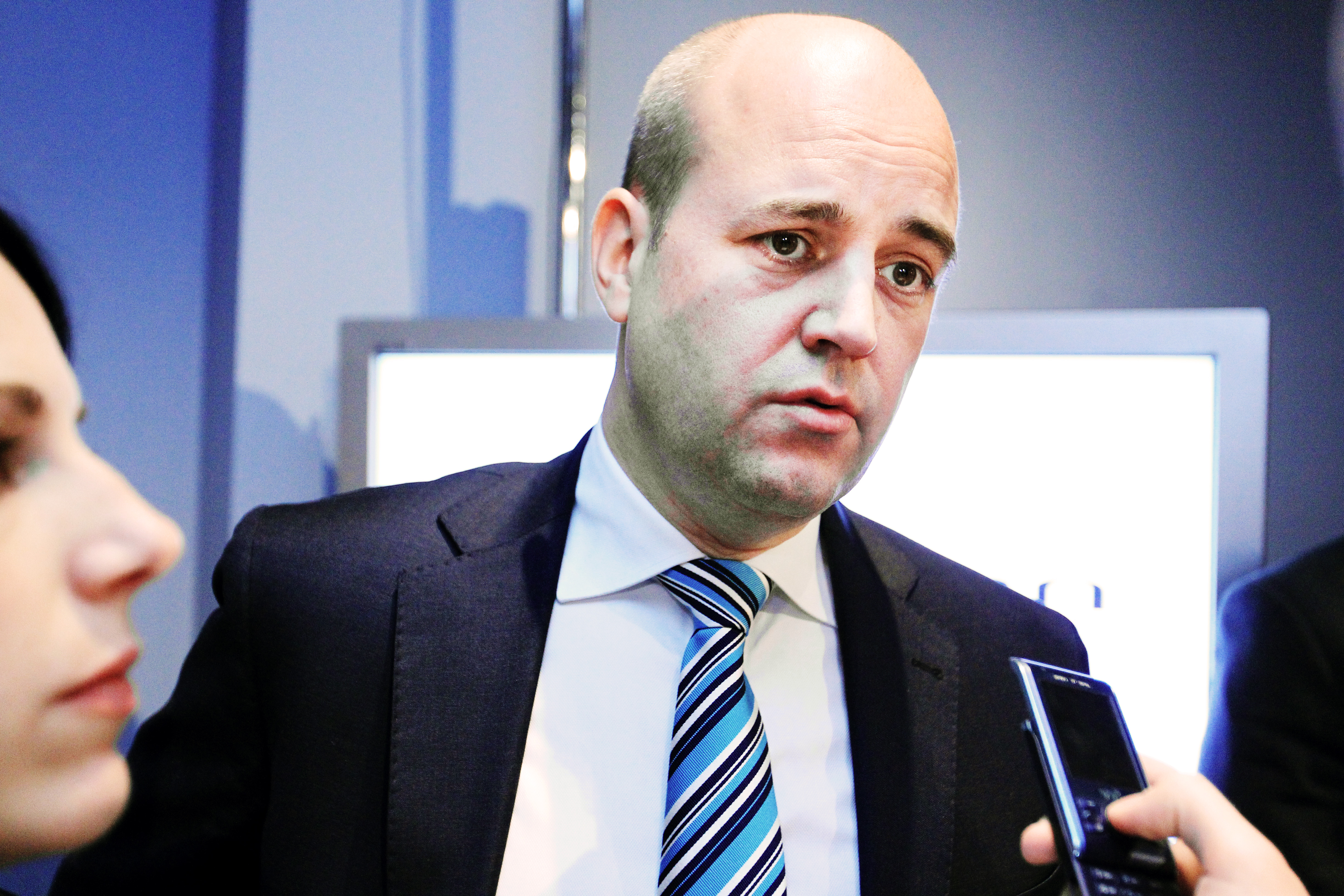 Fredrik Reinfeldt, statsminister Sverige. Nordiska rådets session 2010